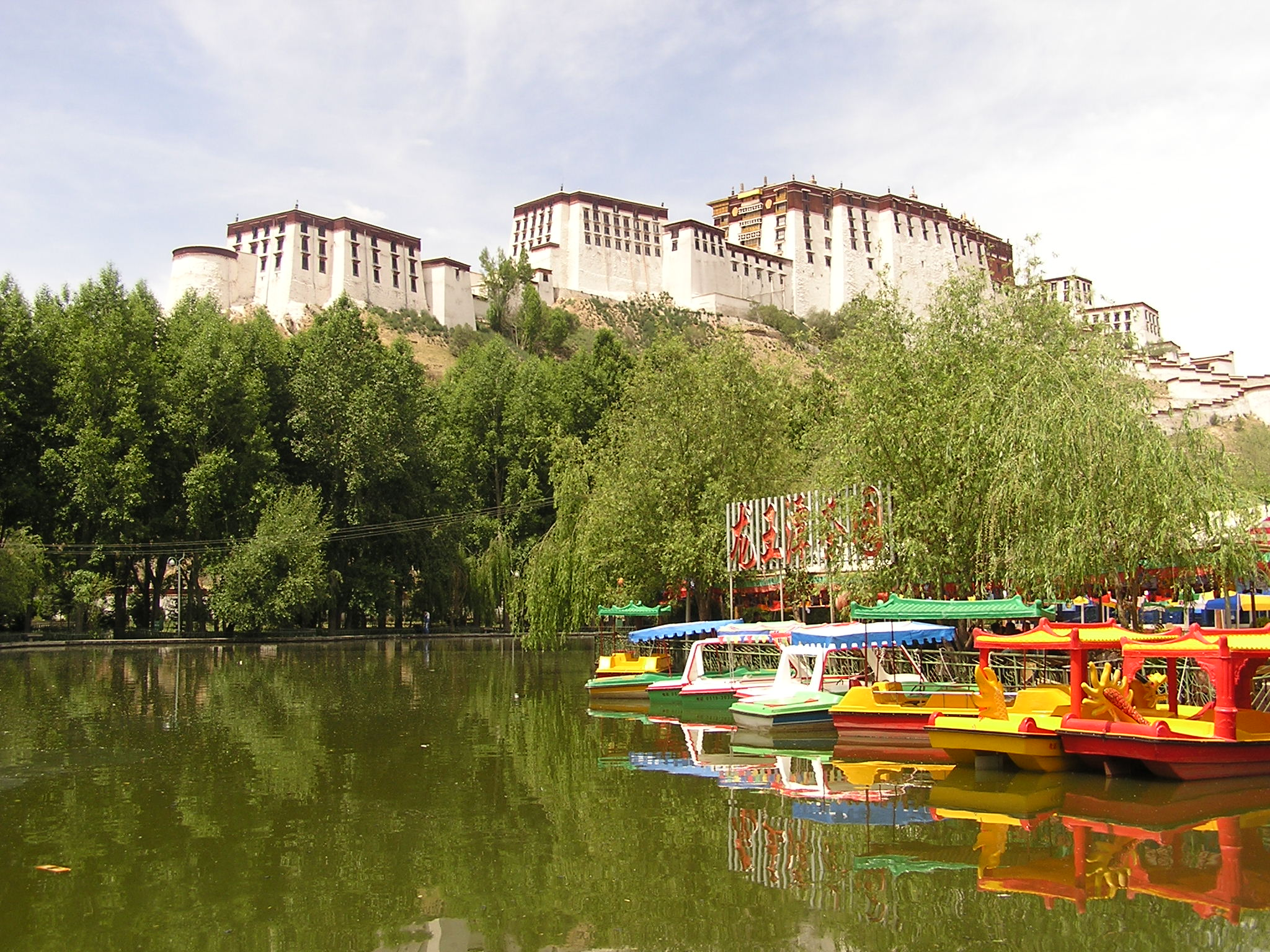 Lhukhang 7